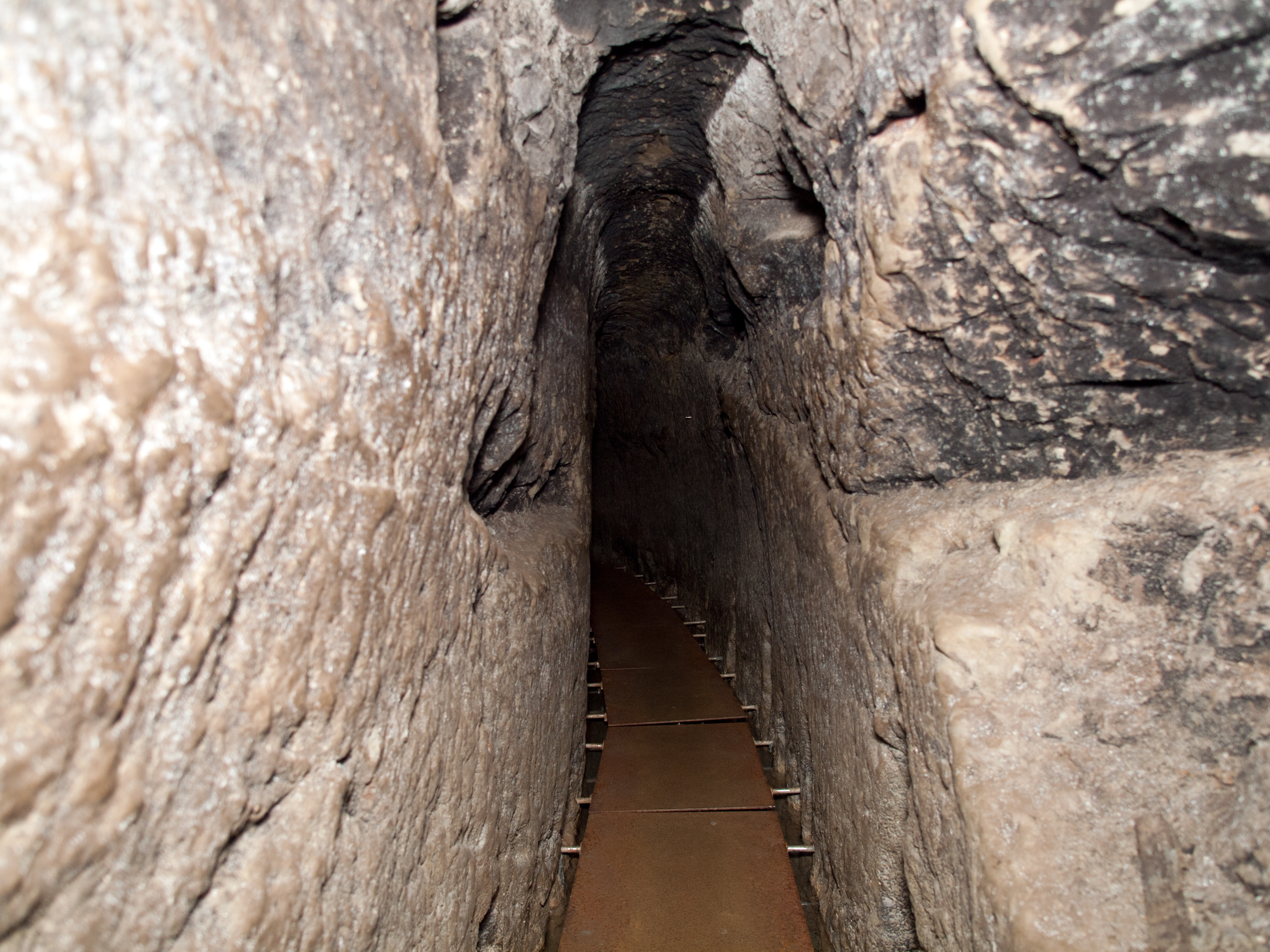 Der der öffentlichkeit zugängliche Teil der Meyerischen Stollen im unter dem Bahnhof Aarau (Zugänglich vom Besuchsraum des Museum Aarau)